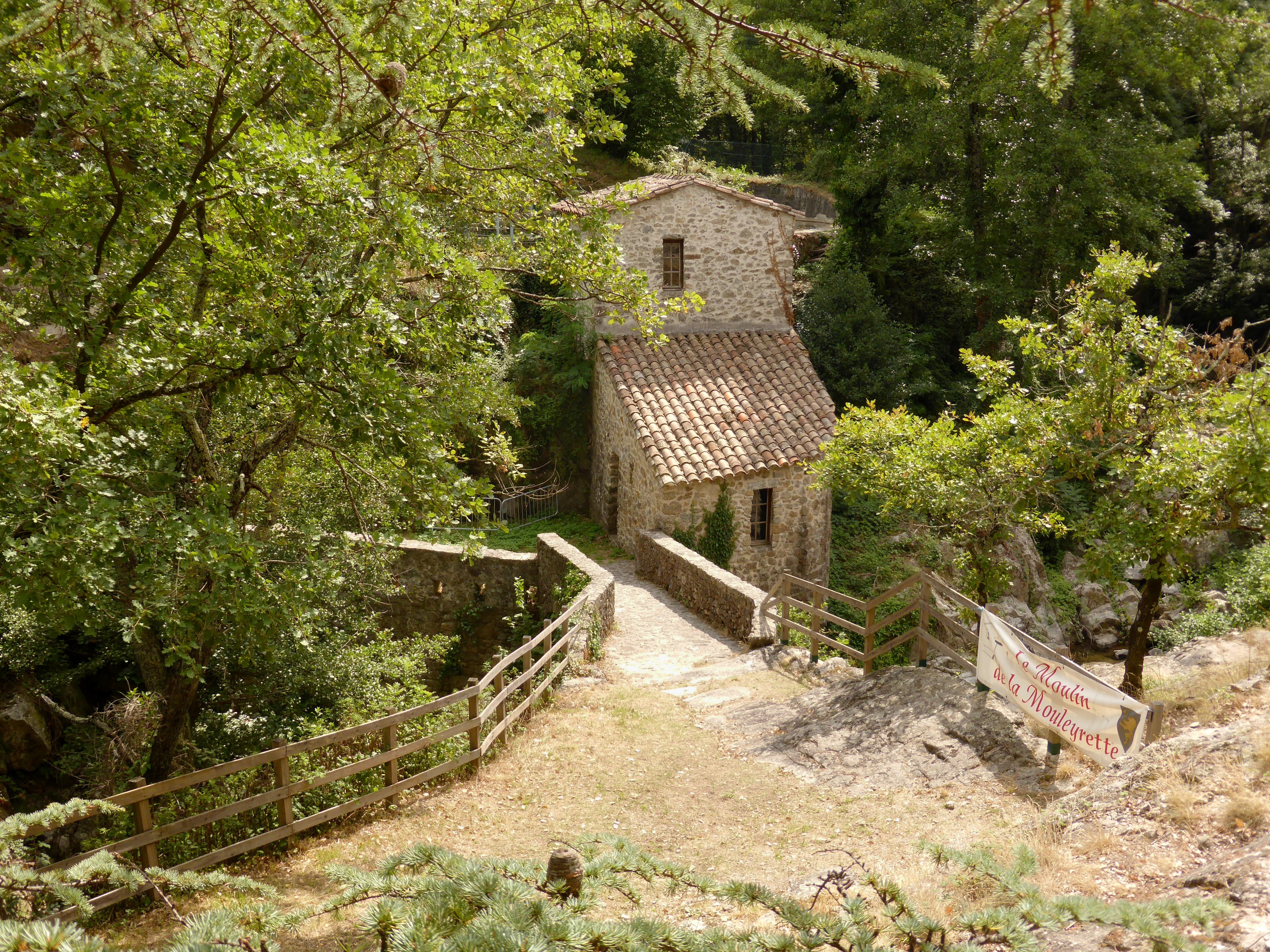 Moulin de la Mouleyrette, Colognac (Gard, France)